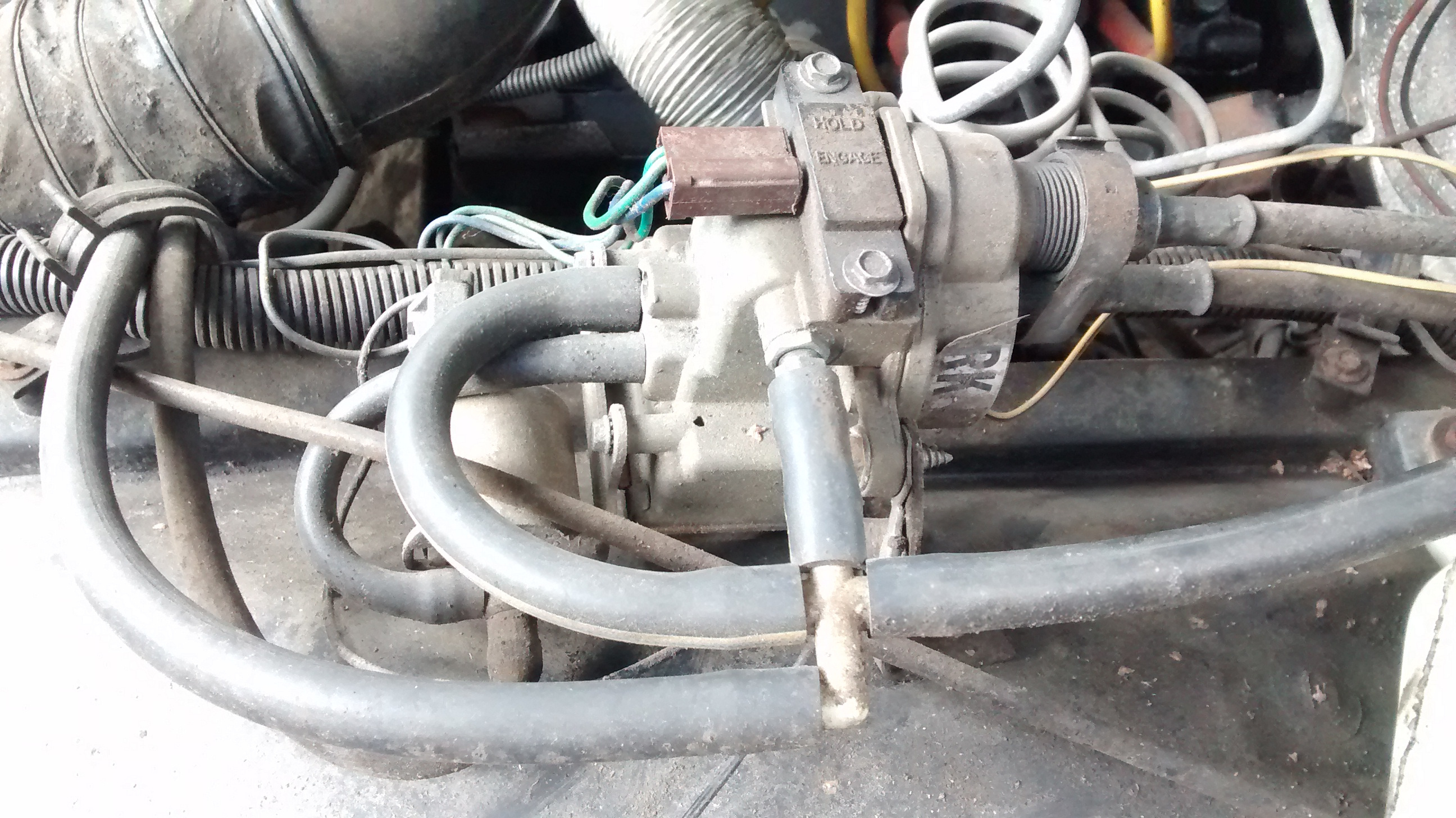 GM Tempomat